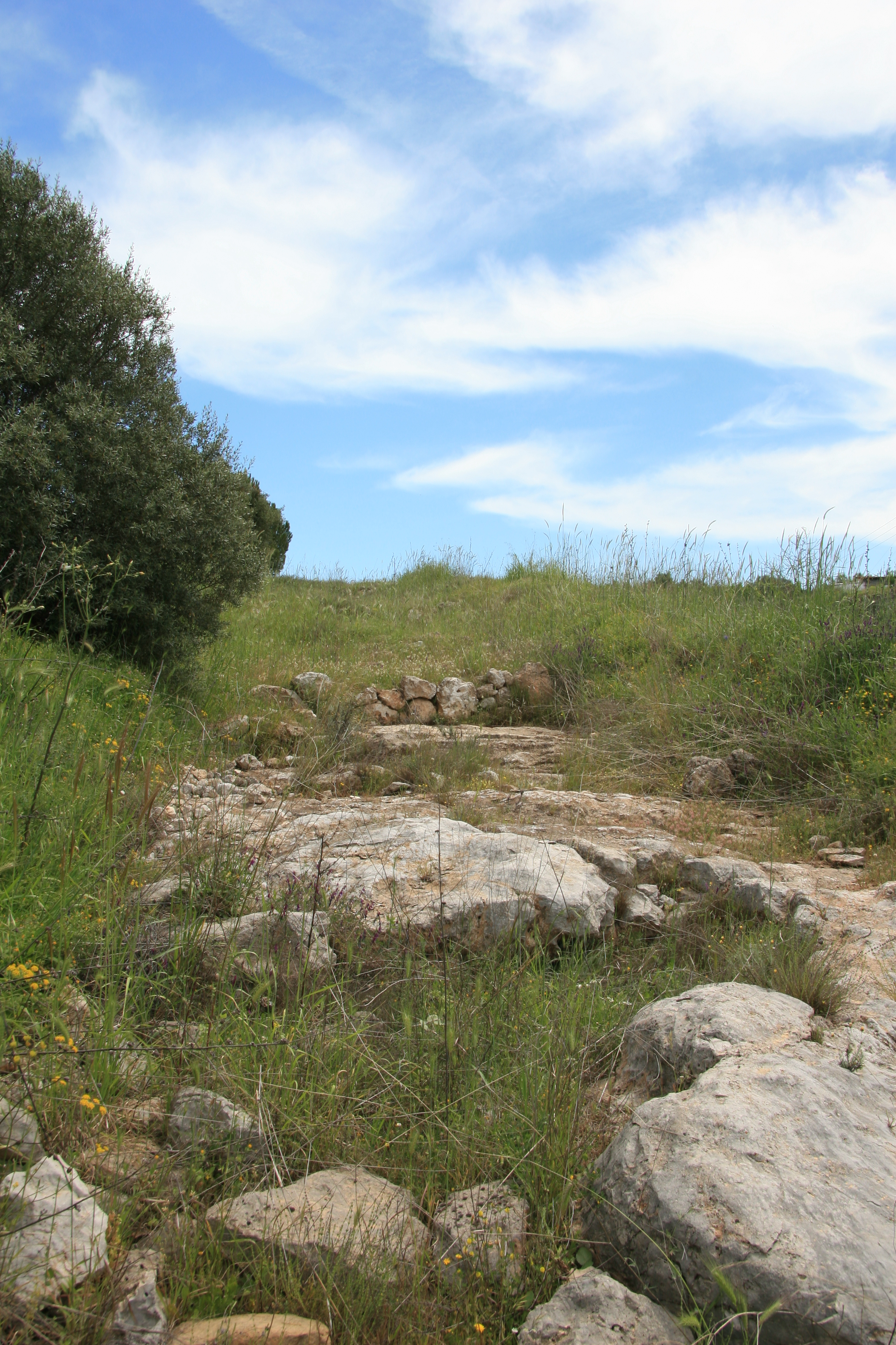 Πρωτοελλαδικός οικισμός Προσκυνά